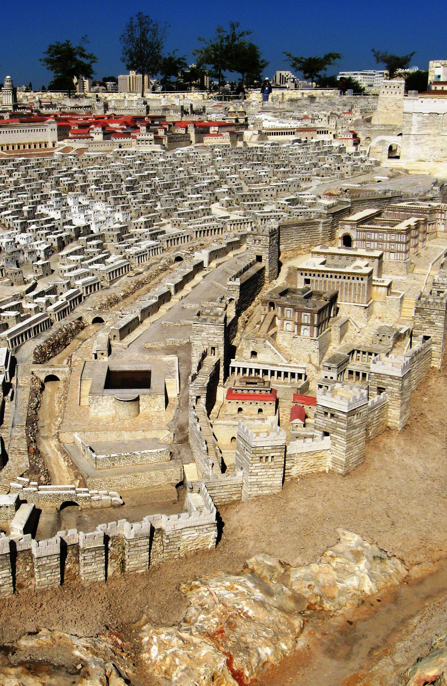 מבט על הארמונות מלכי חדייב מדרום - רישיון נוצר על ידי משתמש:Daniel Ventura